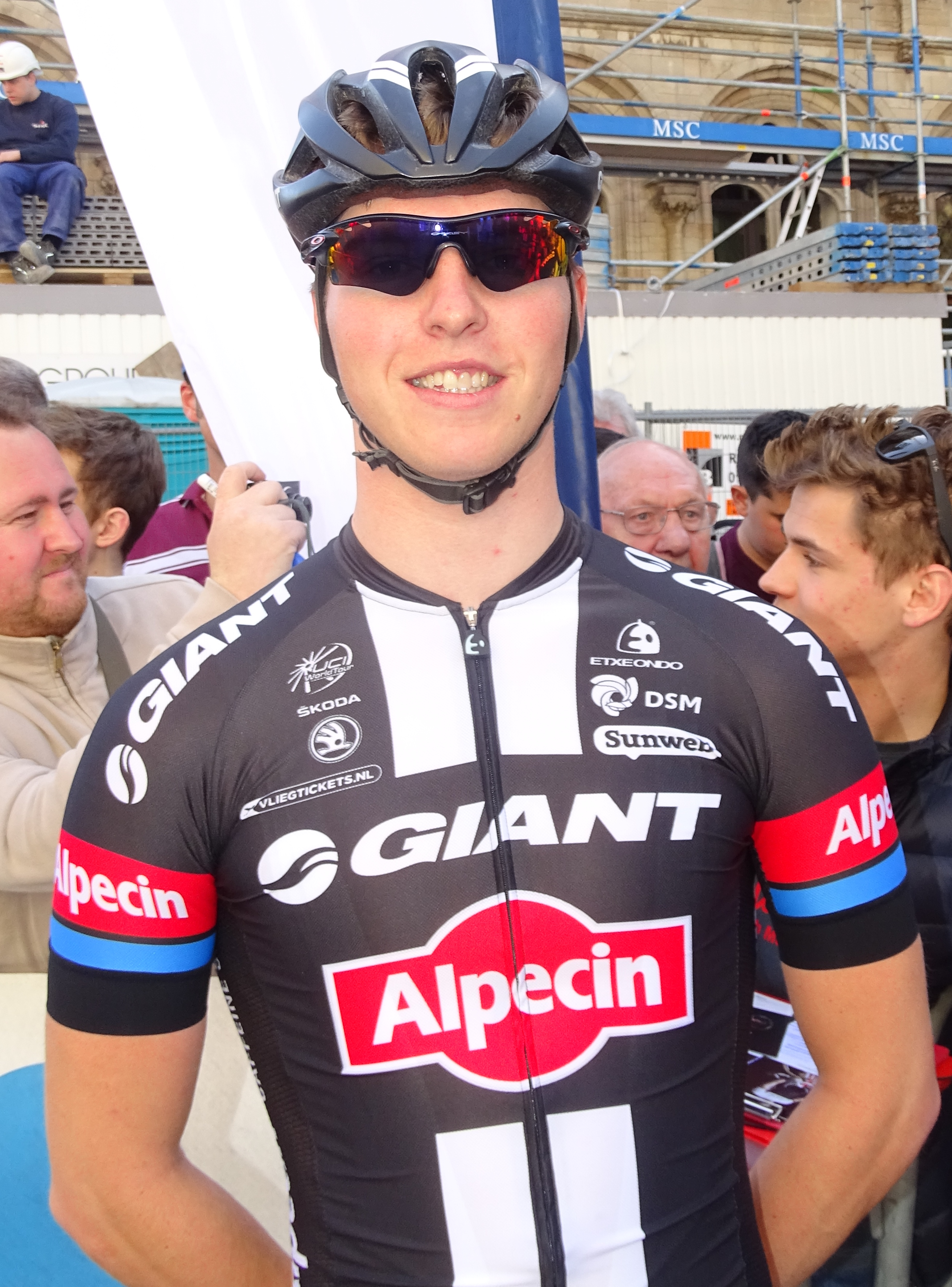 Reportage réalisé le mercredi 15 avril à l'occasion du départ de la Flèche brabançonne 2015 à Louvain, Belgique.